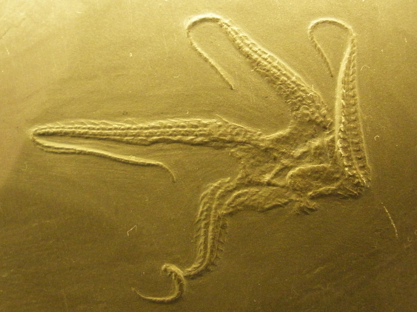 Fossil of Taeniaster, an extinct echinoderm - Took the photo at Naturalis museum, Leiden